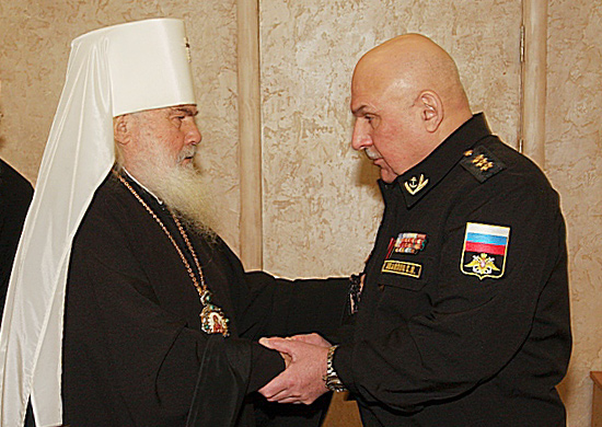 Митрополит Владивостокский и Приморский Вениамин вручает командующему Тихоокеанским флотом адмиралу Сергею Авакянцу патриаршую награду — юбилейную медаль Русской православной церкви «В память тысячелетия преставления равноапостольного великого князя Владимира»